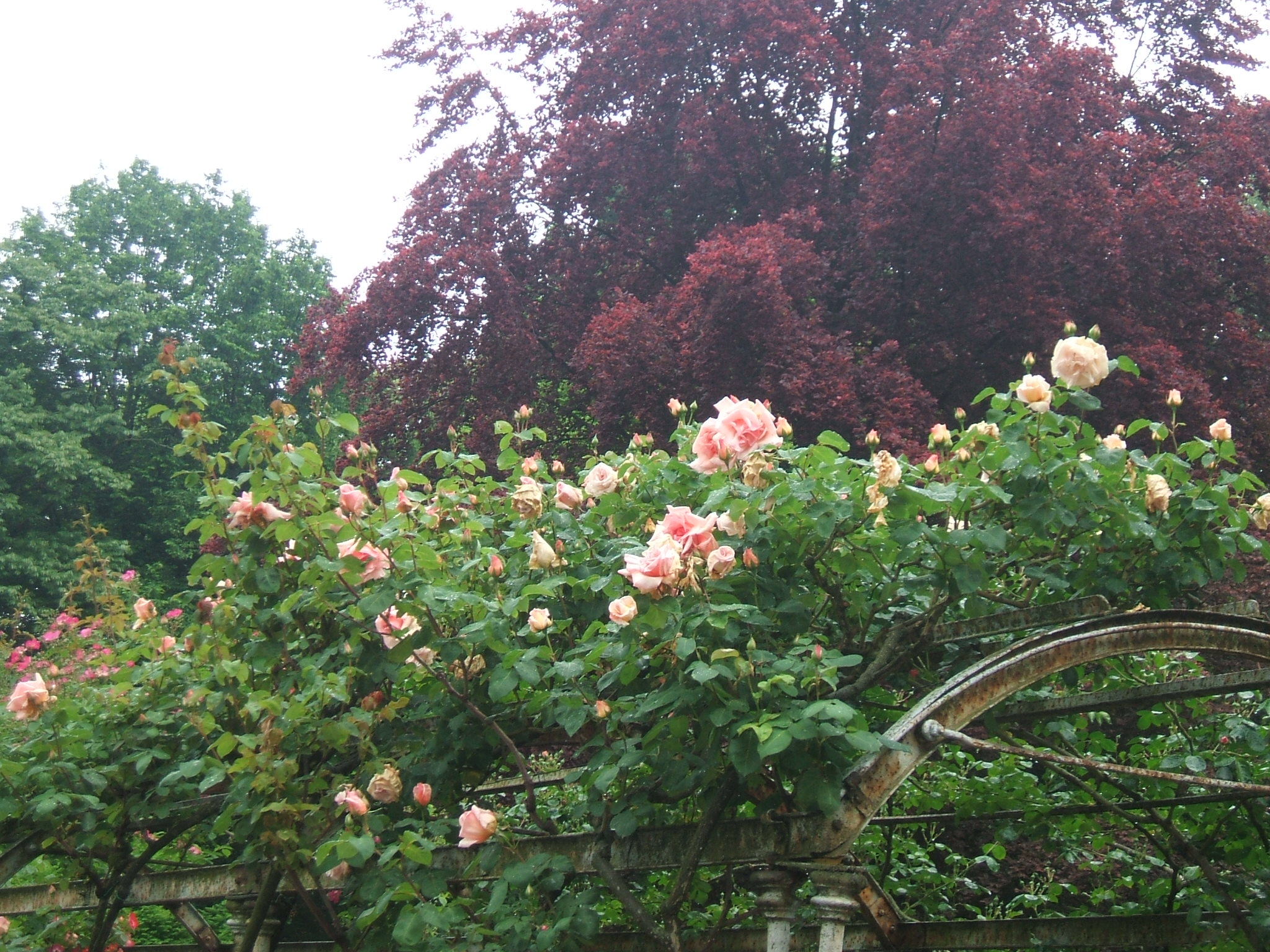 particolare roseto orto botanico Pavia